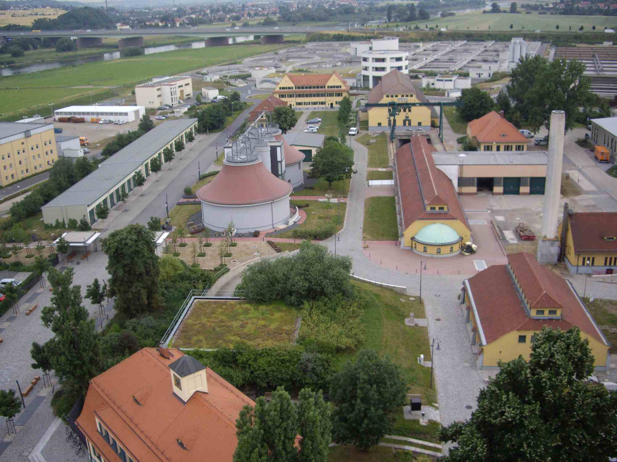 Blick über die historischen Erlweinbauten (Einlaufgruppe mit Grob- und Feinrechen, Sandfang, Pumpwerk I) in Richtung Biologie, im Hintergrund die Elbe und die Bundesautobahn A 4